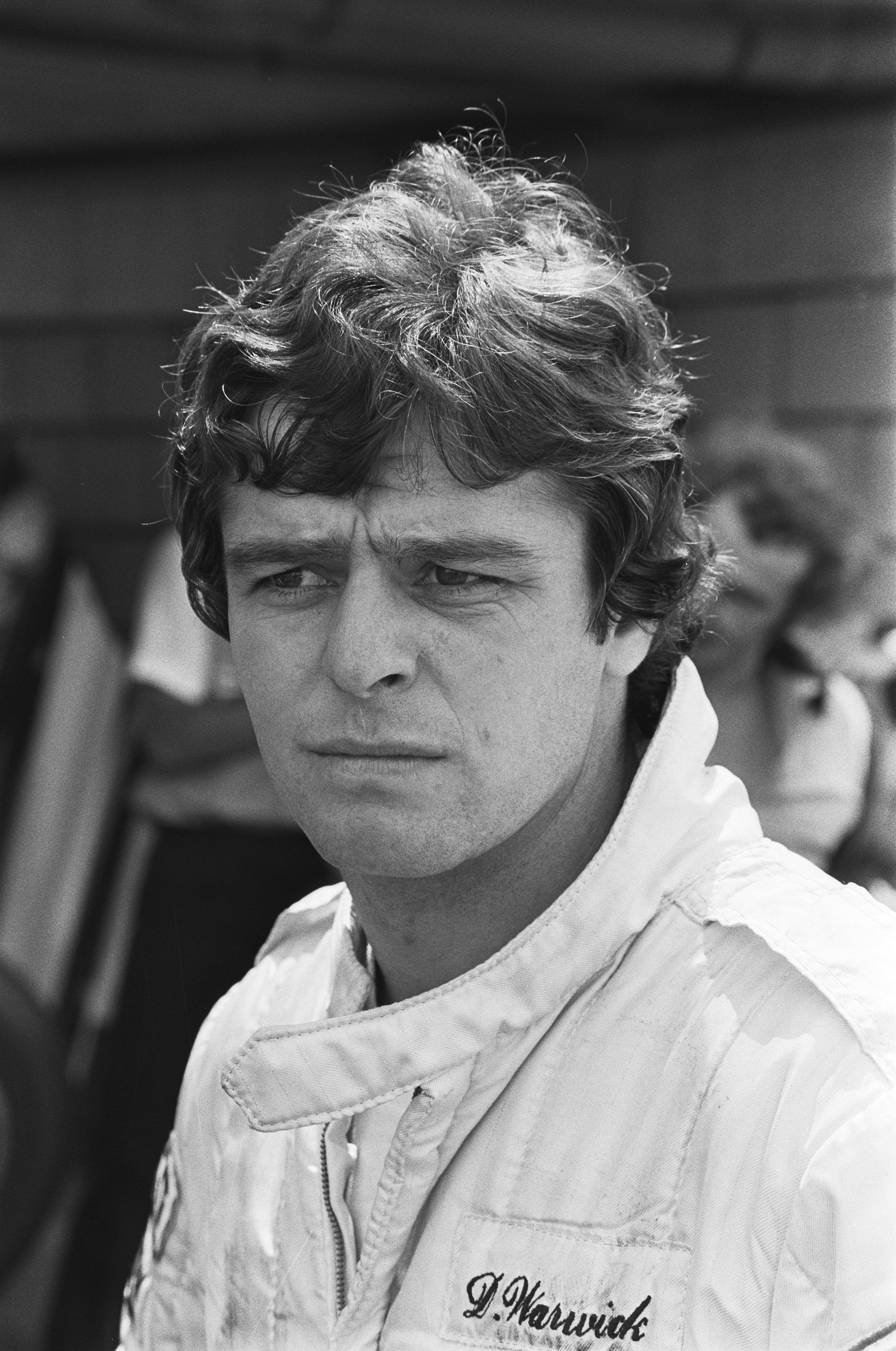 Collectie / Archief : Fotocollectie Anefo Reportage / Serie : [ onbekend ] Beschrijving : Grand Prix van Nederland te Zandvoort; koppen coureurs, Derek Warwick Datum : 3 juli 1982 Locatie : Noord-Holland, Zandvoort Trefwoorden : coureurs Persoonsnaam : Grand Prix van Nederland Fotograaf : Dijk, Hans van / Anefo Auteursrechthebbende : Nationaal Archief Materiaalsoort : Negatief (zwart/wit) Nummer archiefinventaris : bekijk toegang 2.24.01.05 Bestanddeelnummer : 932-2375